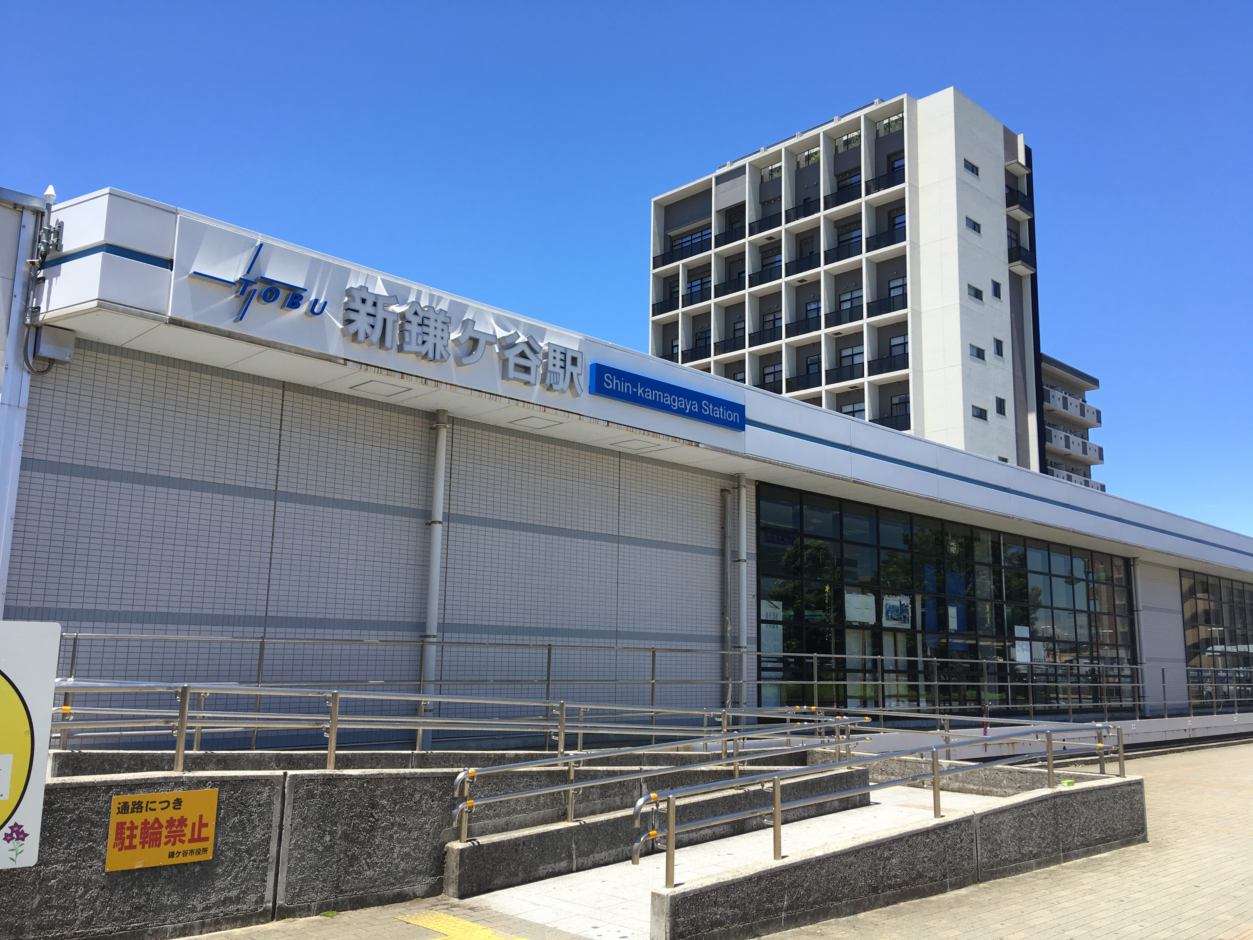 東武鉄道新鎌ヶ谷駅舎入口